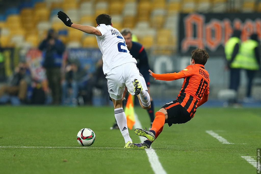 16.10.2015 г.Киев. НСК "Олимпийский". 11-й тур Лиги Пари-Матч. Динамо Киев - Шахтер Донецк - 0:3